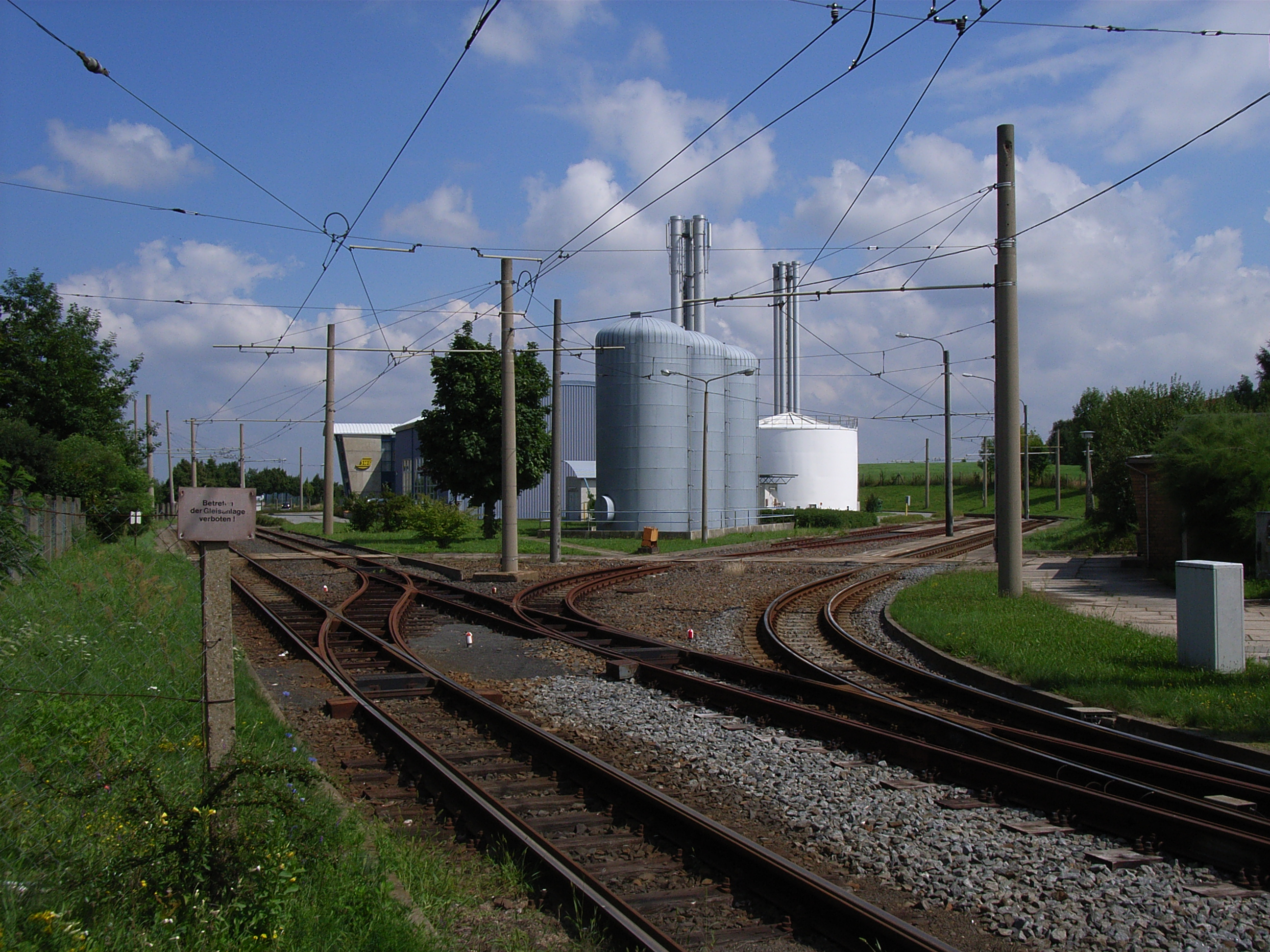 Wendeschleife Königshufen, Am Wiesengrund und BHKW Nord in Görlitz Königshufen